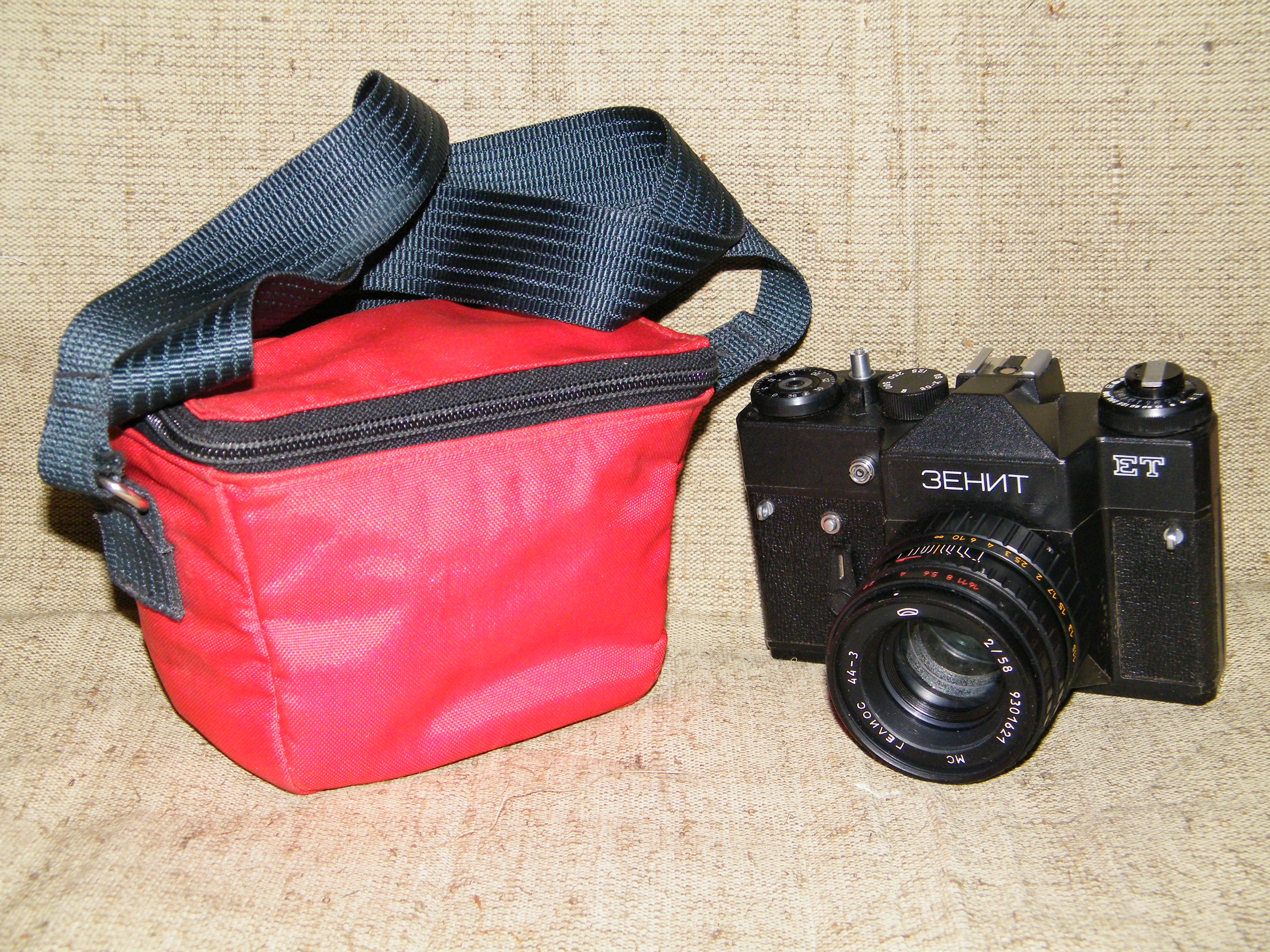 Зенит-ЕТ (1994) и футляр